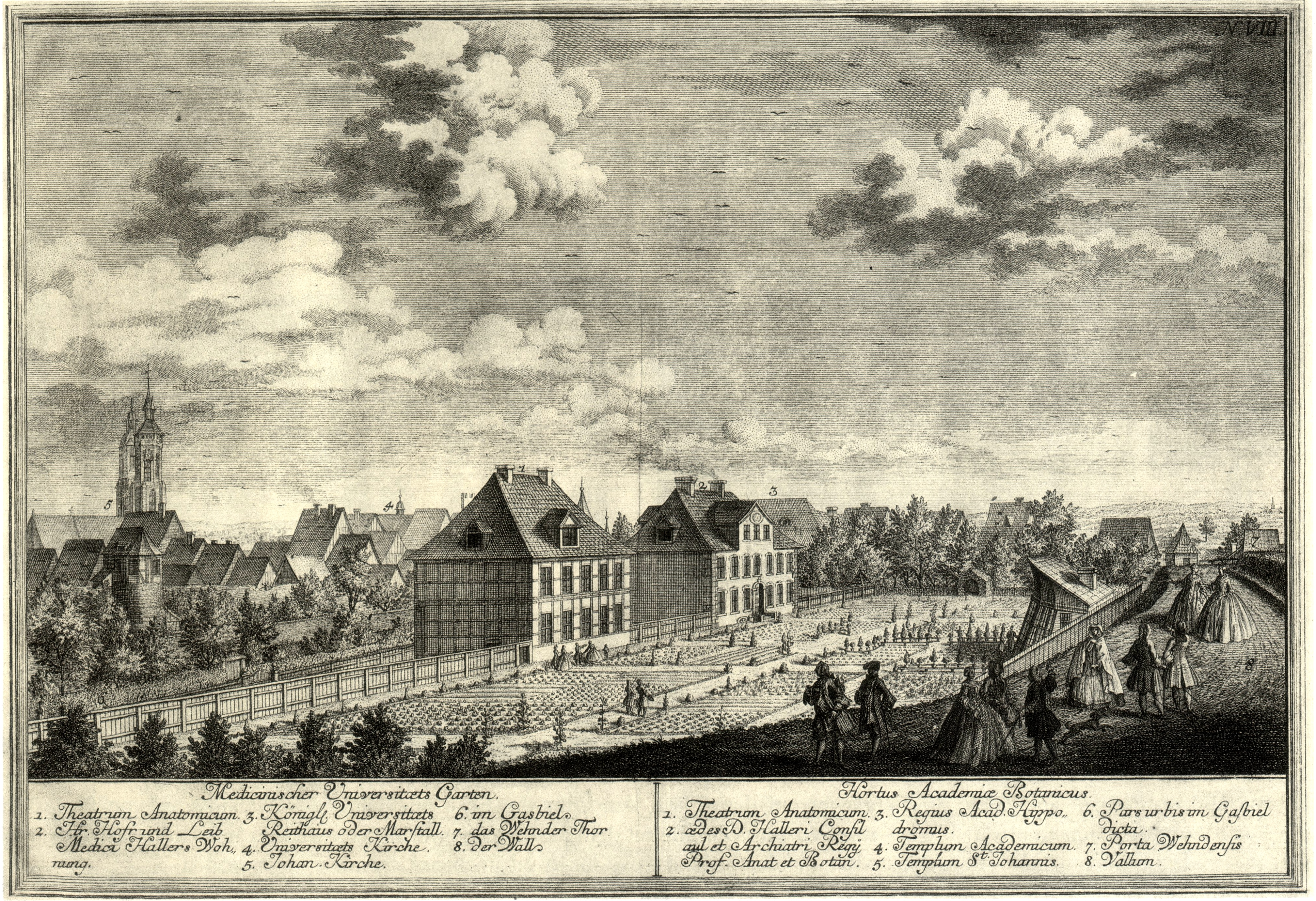 Botanischer Garten der Georg-August-Universität Göttingen, Blick vom Wall nach Südwesten. Kupferstich, Tafel VIII aus Wahre Abbildung, Der Königl. GroßBritan. und Churfürstl. Braunschw. Lüneb. Stadt, Göttingen. Ihrer Grund-Lage, Aüserl. und Innerliche Prospecte und der Zum Georg Augustus Universitaet gehörigen gebäude Gezeichnet, und in Kupffer herauß gegeben, durch Georg Daniel Heumann Königl. Groß-Brit. Hoff und Universitaets Kupfferstecher in Goettingen